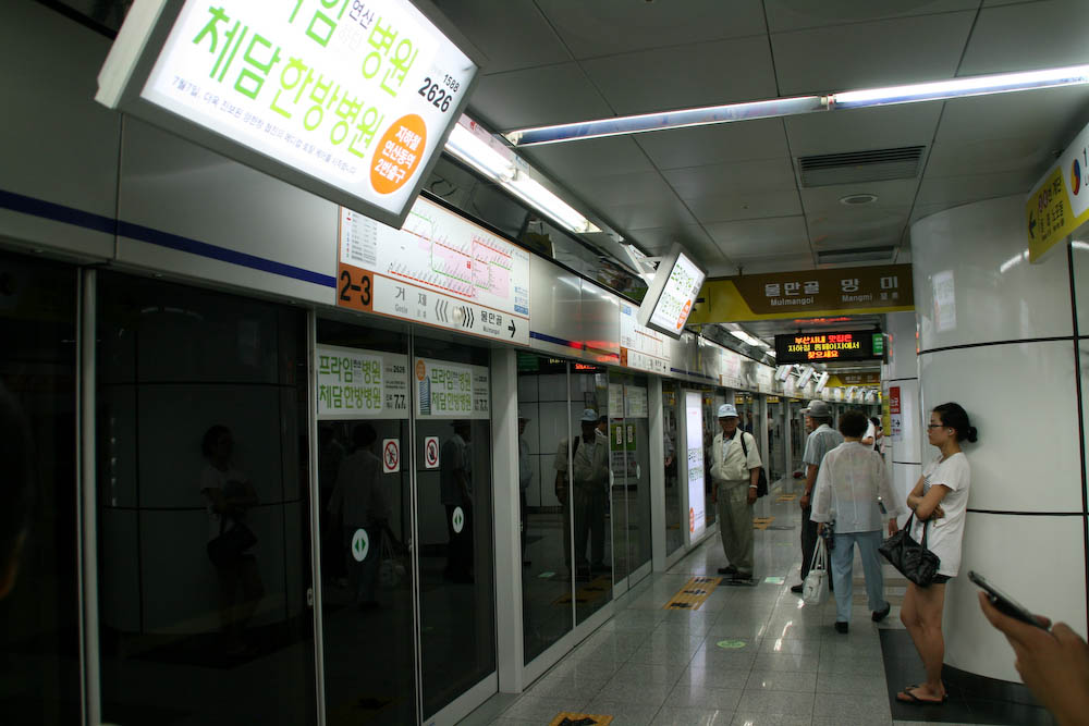 Busan Subway